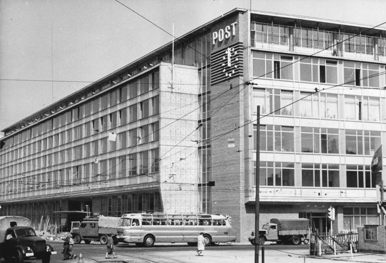 Leipzig, Hauptpost Zentralbild Koch-Kluge 2.9.1964 Das modernste Postgebäude der DDR ist das mit einem Kostenaufwand von 14 Millionen MDN gebaute Postamt C I in Leipzig. Das 110 Meter lange Gebäude wurde als erster Bauabschnitt einen großen Postkomplexes errichtet. Sehr gefällig wirkt die Aluminium-Glasvorhängefassade.